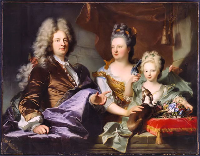 Triple portrait représentant Jean Le Juge, son épouse et sa fille en position assise